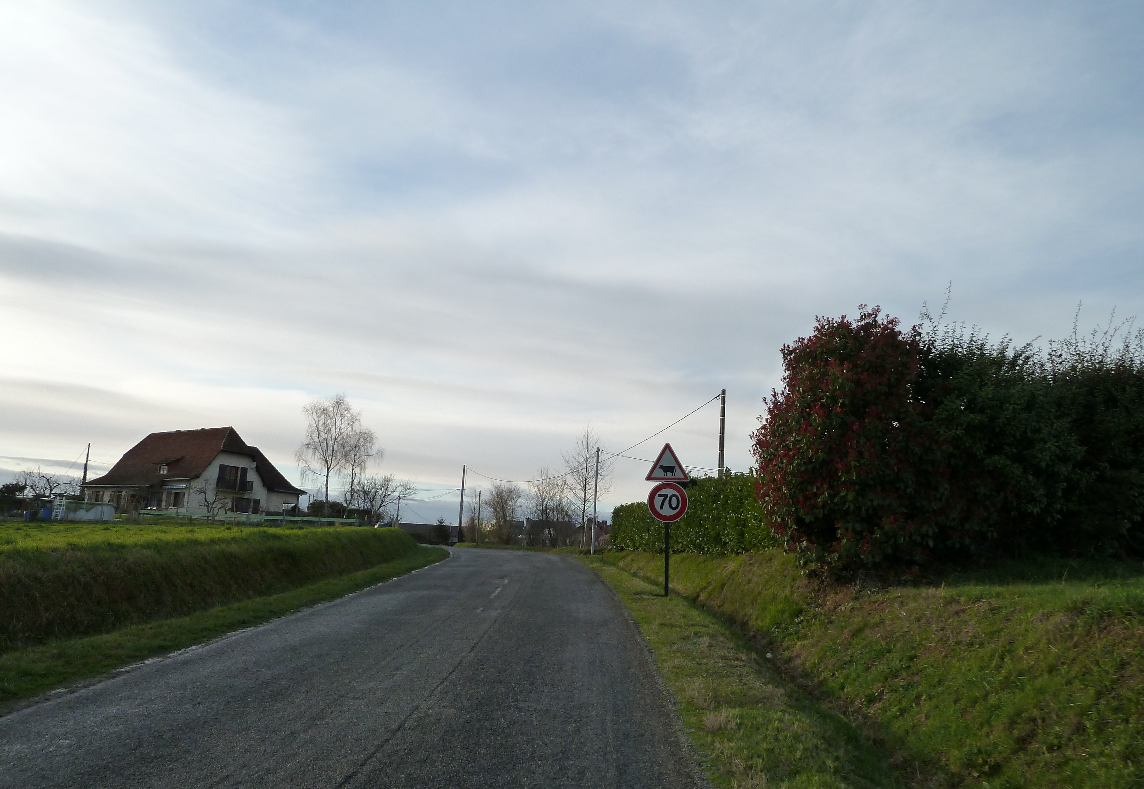 Lonçon